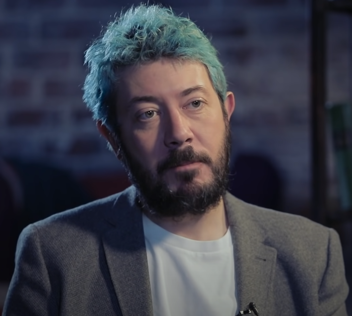 Артемий Лебедев. Интервью 2020.